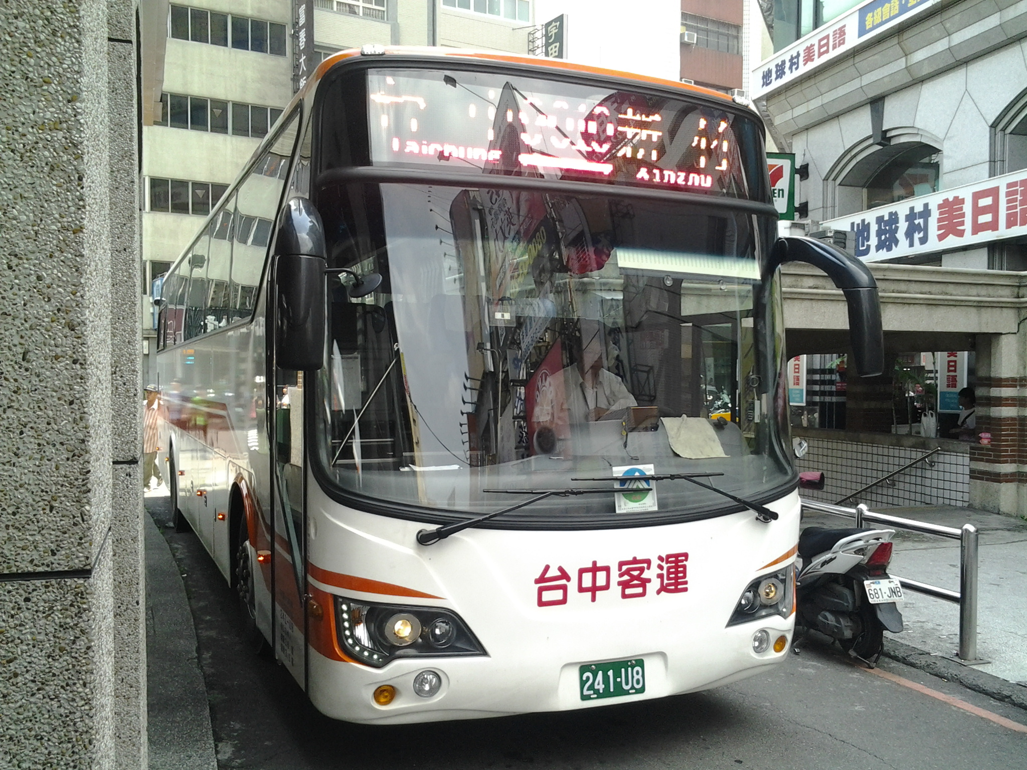 臺中客運2014年大宇BC211MA大客車241-U8車頭。